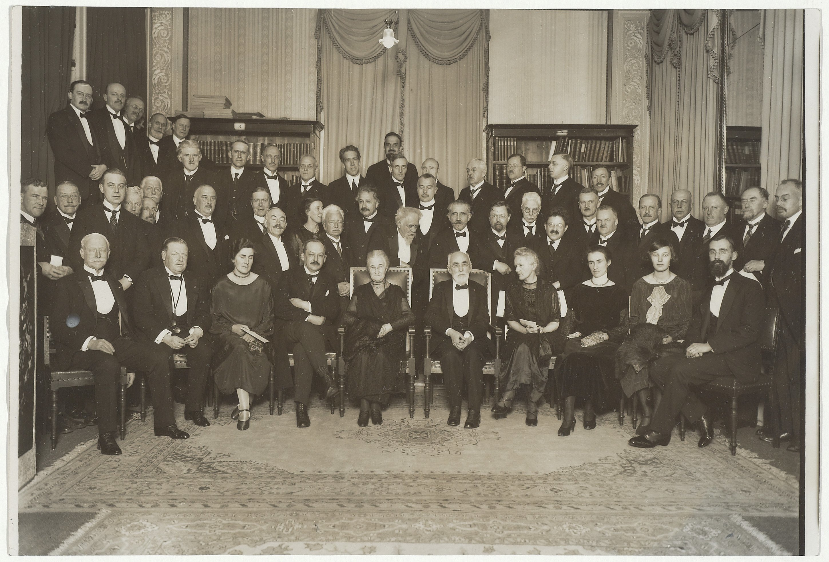 Bibliotheek van de Hollandse Maatschappij der Wetenschappen, Haarlem. De huldiging van professor Lorentz bij zijn gouden doctoraat (zijn promotie was in 1875 in Leiden op het proefschrift Over de theorie der terugkaatsing en breking van het licht) met 52 van de 54 dinergasten.